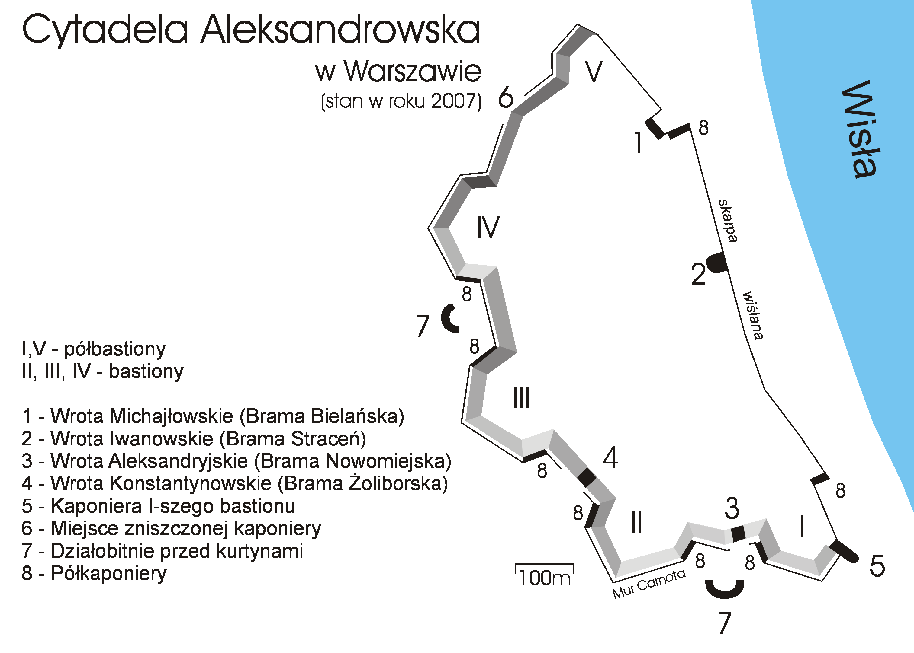 Schemat orientacyjny przedstawiający stan obecny i rozmieszczenie obiektów Cytadeli Aleksandrowskiej (Warszawskiej). Wykonanie na podstawie: R. Bochenek, "1000 słów o inżynierii i fortyfikacjach", zdjęcia satelitarne i badania terenowe: Zbigniew Strucki .